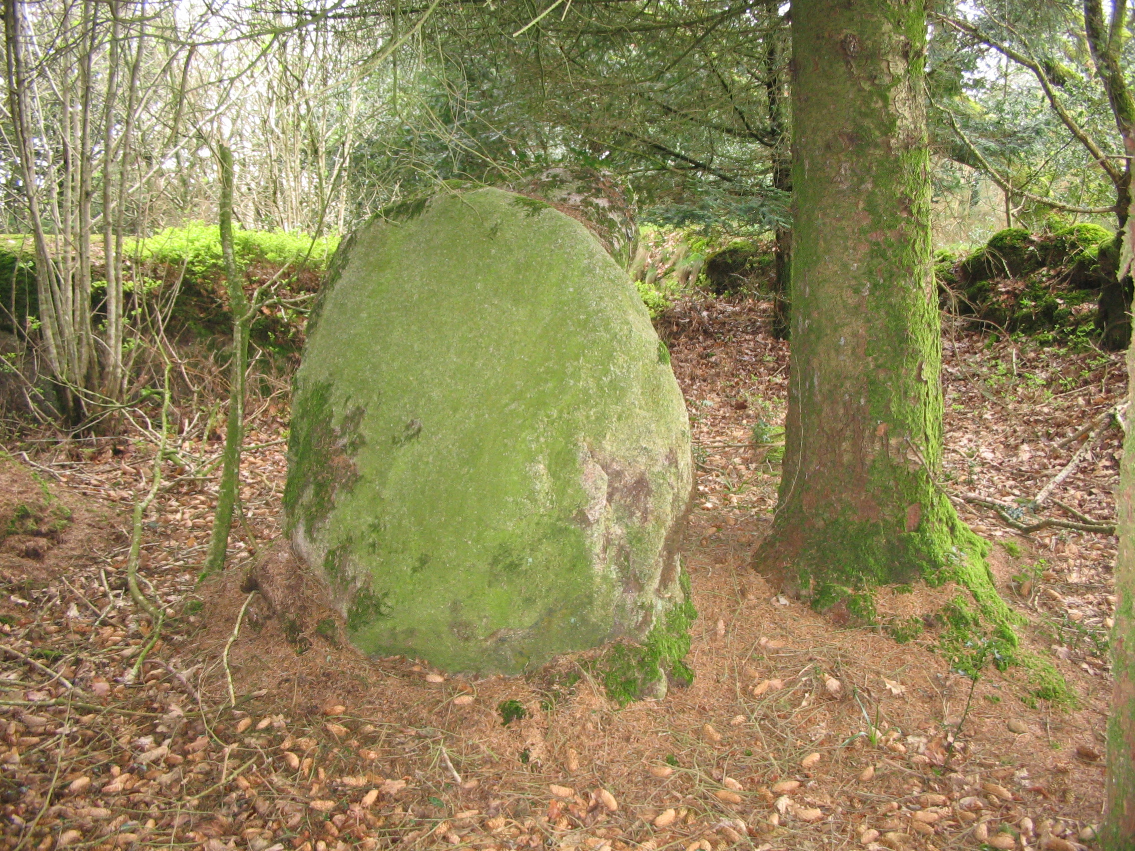 Lit de St-Eneour, Plounéour-Menez, hoël gwazgwenn.